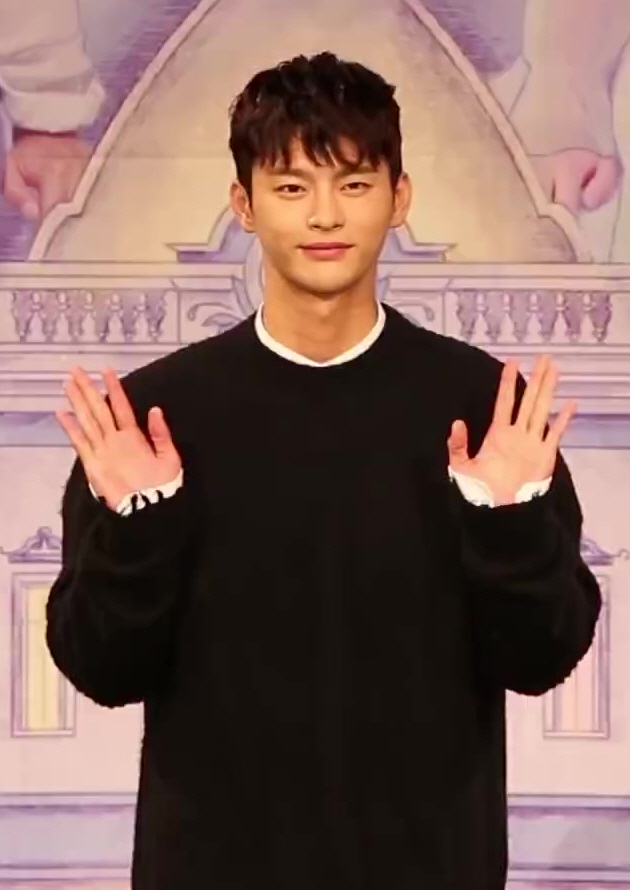 (TV10) 쇼핑왕 루이 서인국, 거지 분장… 감독님이 말릴 정도로 적극적 (제작발표회)